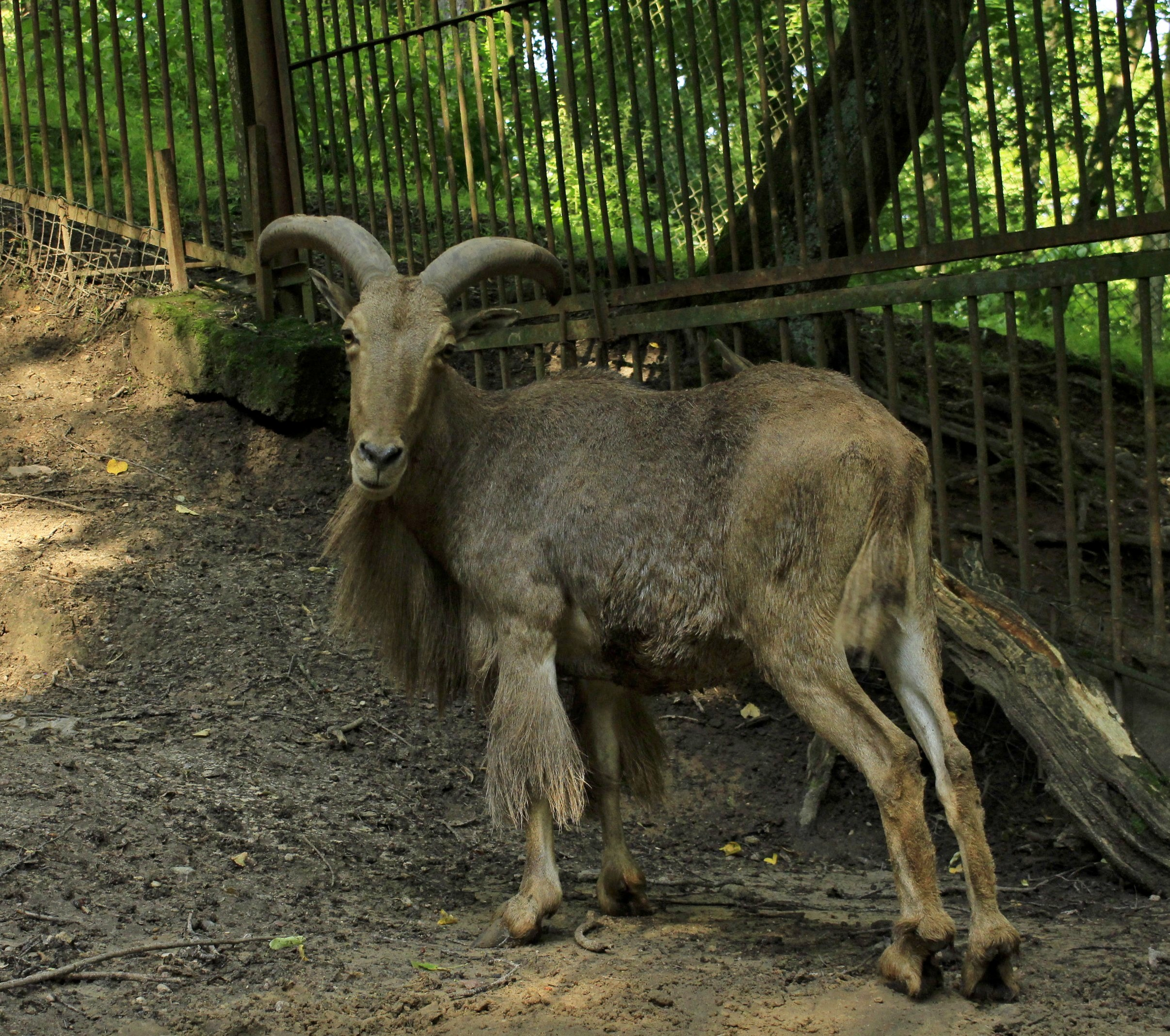 Sibiro kalnų ožys Lietuvos zoologijos sode